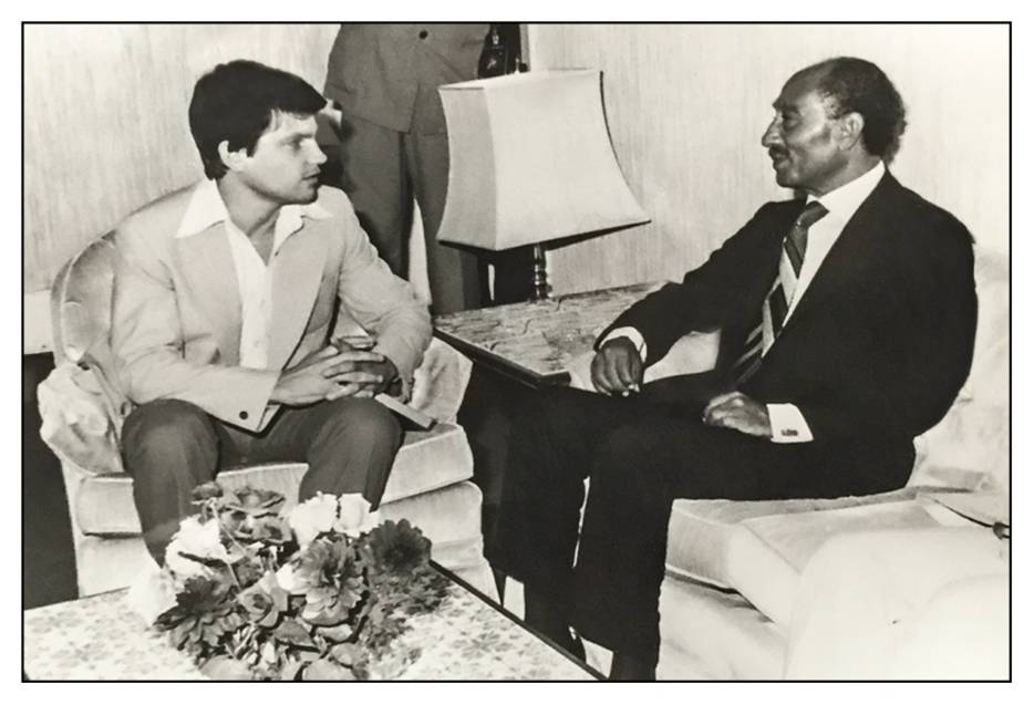 פדן עם אנואר סאדאת בביקור במצרים 1979